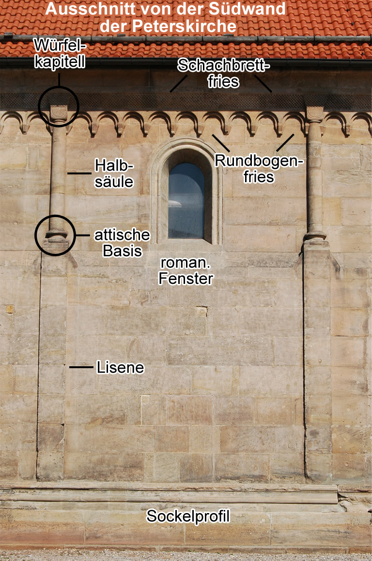 Ausschnitt von der Südwand der Peterskirche, in der Zitadelle Petersberg in Erfurt, mit Beschriftung